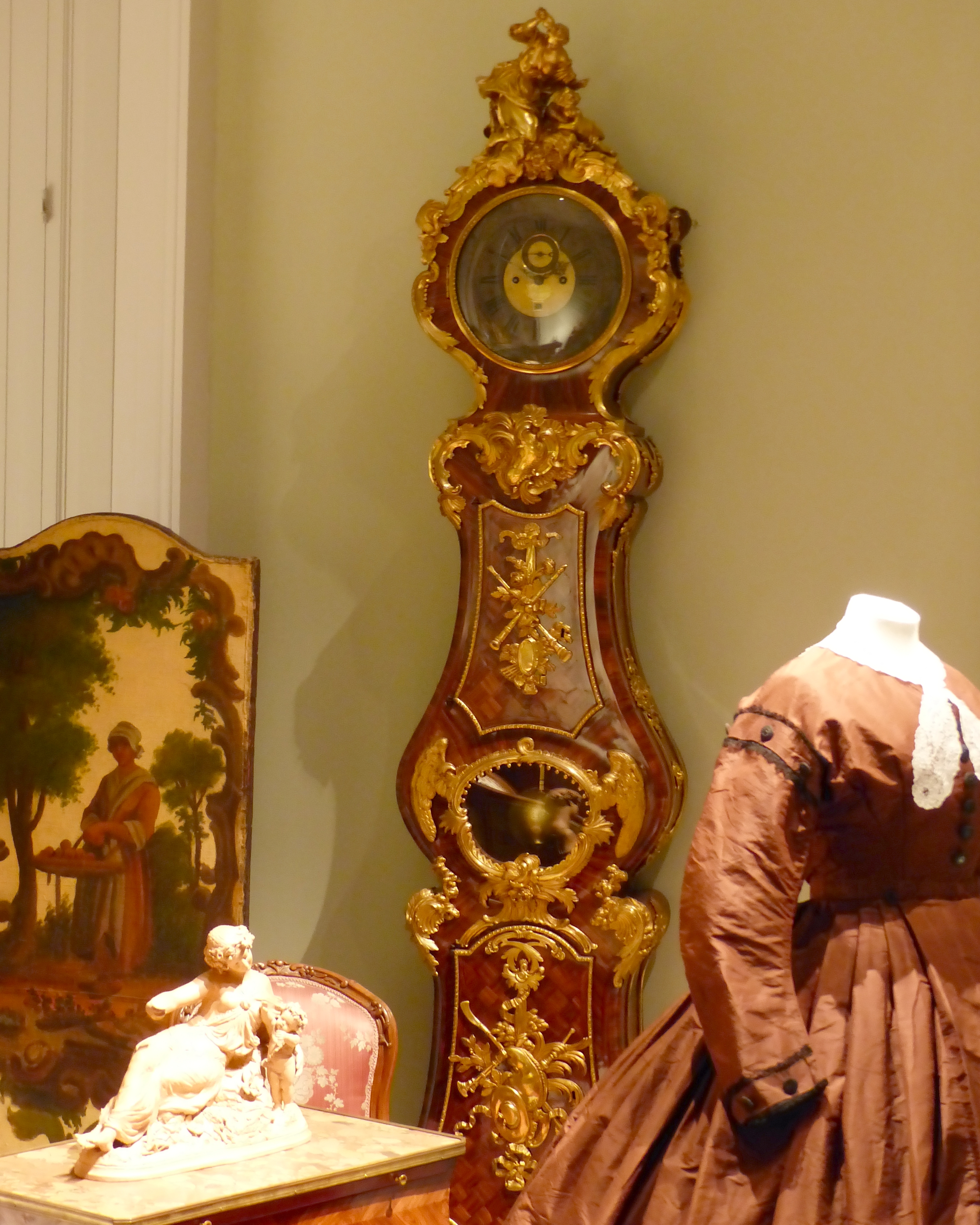 Montpellier (Hérault, France), hôtel particulier Cabrières-Sabatier d'Espeyran, aujourd'hui annexe du musée Fabre. Régulateur de parquet de l’horloger Jean-Baptiste Baillon.